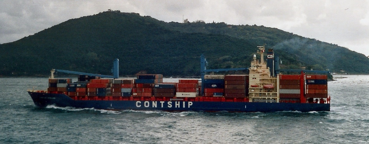 La Spezia Italien